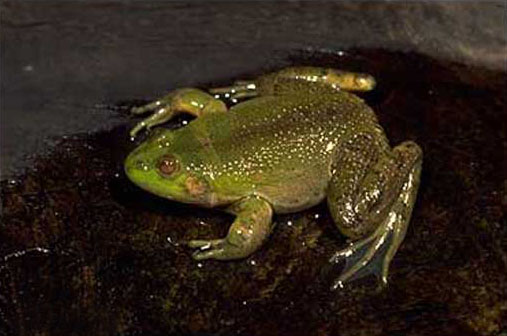 Podonectes cardosoi